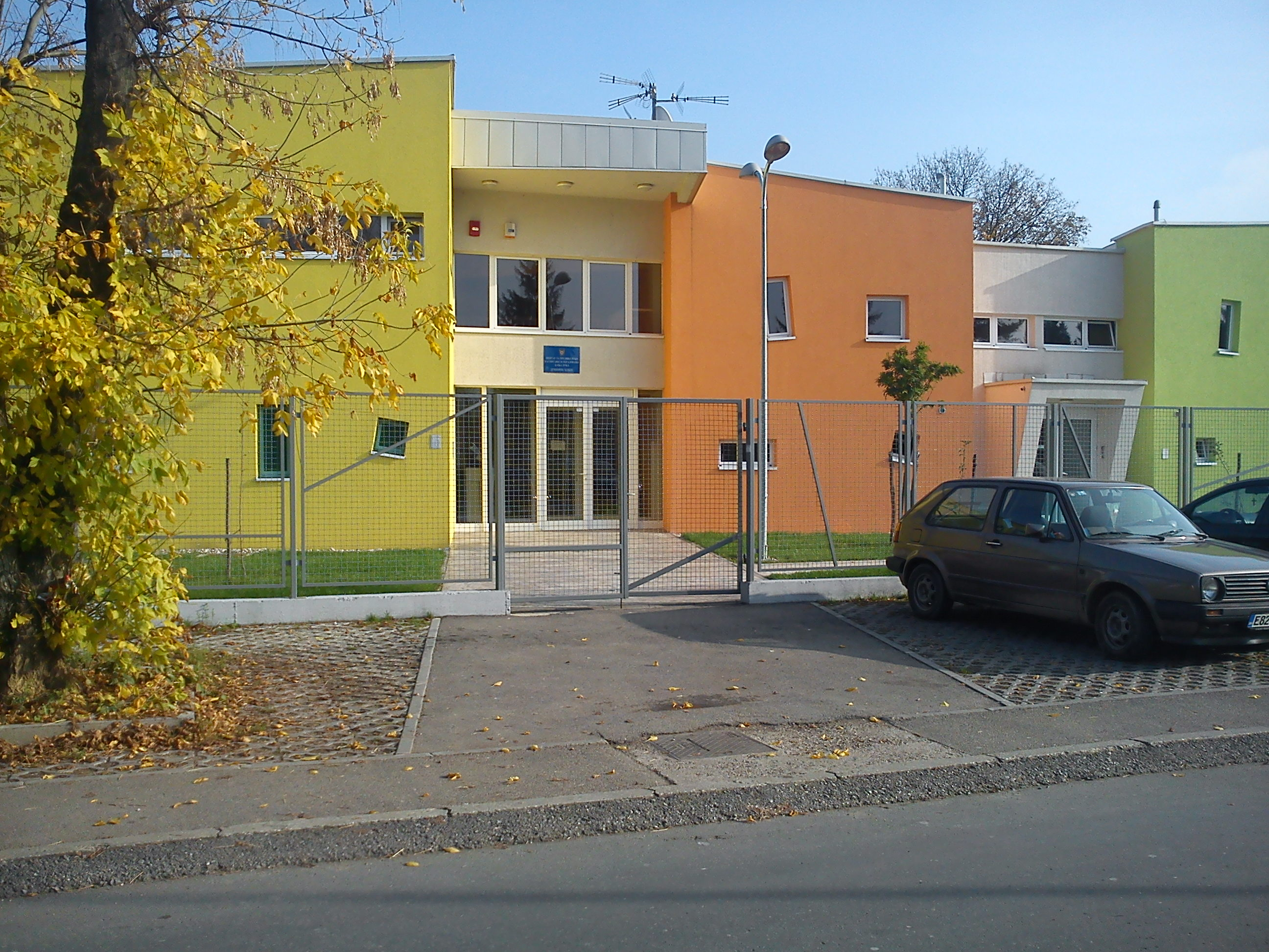 Вртић "Колибри", Лазарево, БЛ